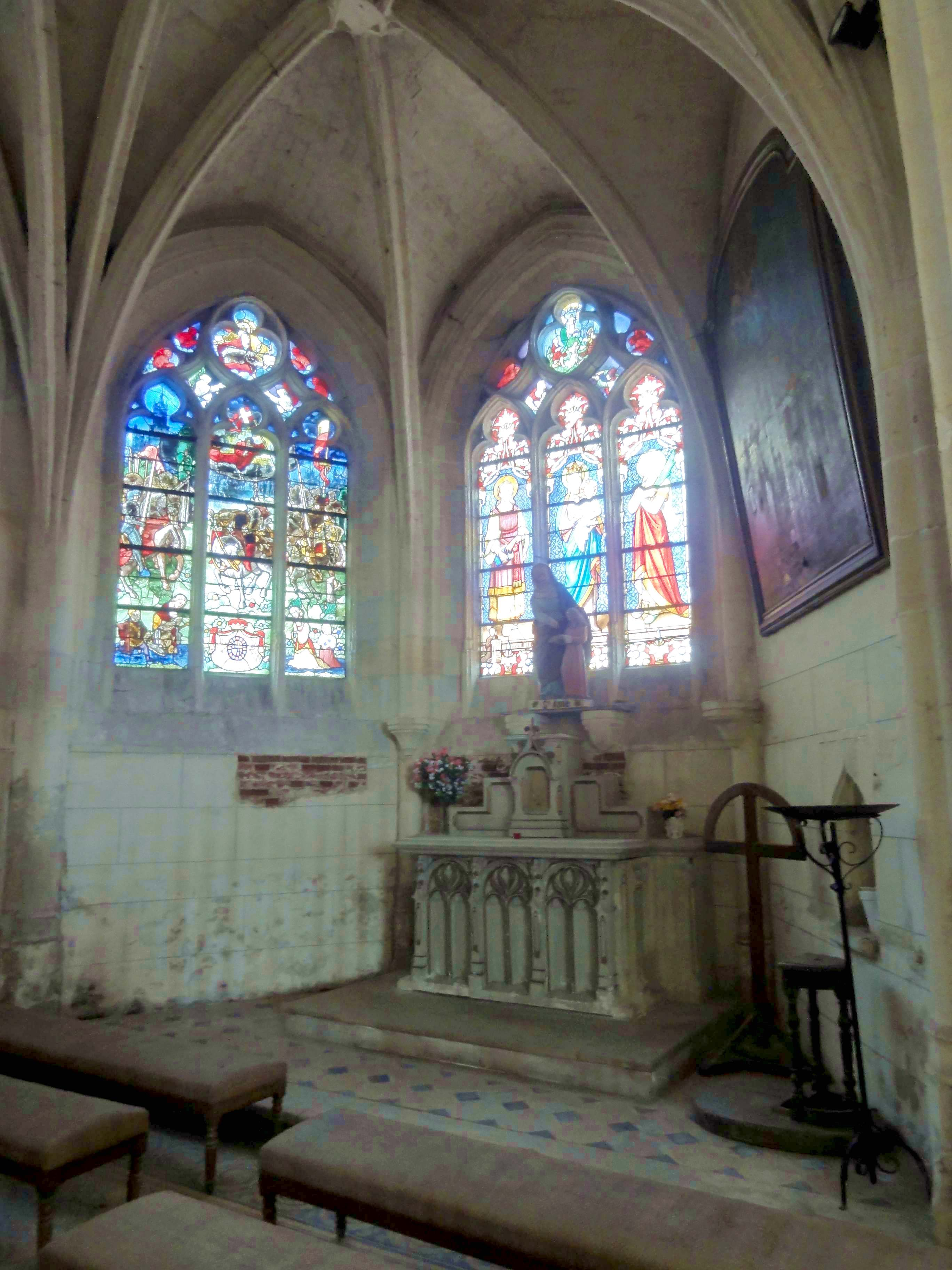 Intérieur de l'église (voir titre).